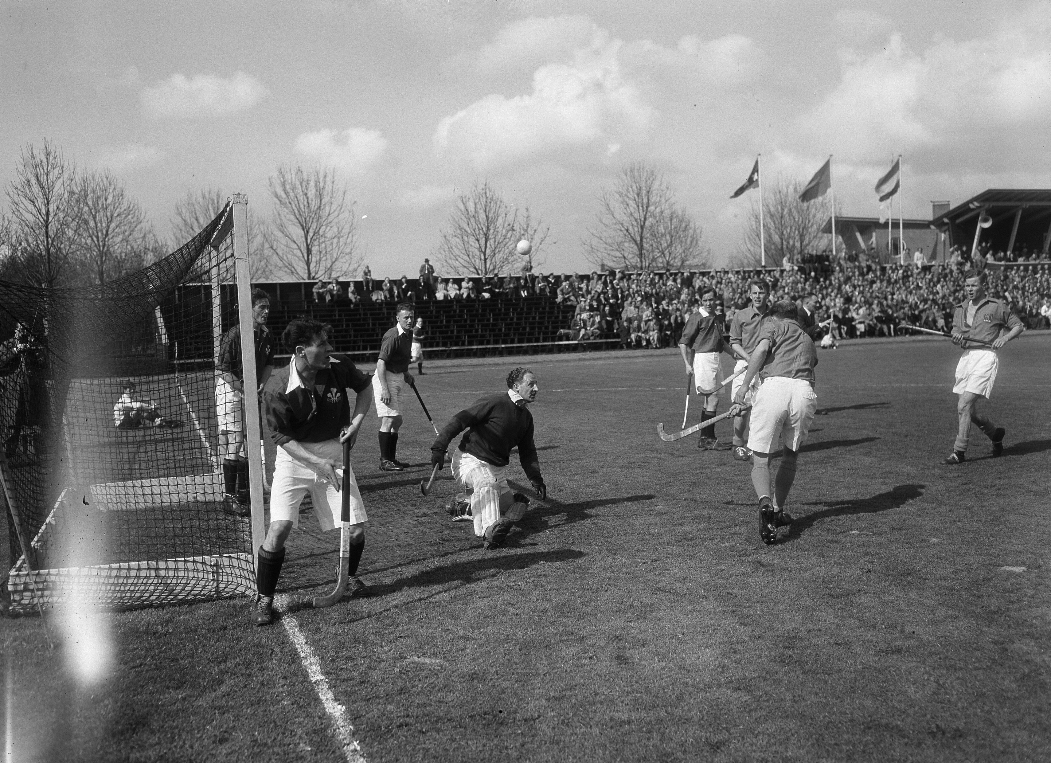 Collectie / Archief : Fotocollectie Anefo Reportage / Serie : [ onbekend ] Beschrijving : Hockey Nederland tegen Wales 4-0 Datum : 29 april 1951 Trefwoorden : hockey Fotograaf : Duinen, […] van / Anefo Auteursrechthebbende : Nationaal Archief Materiaalsoort : Glasnegatief Nummer archiefinventaris : bekijk toegang 2.24.01.09 Bestanddeelnummer : 904-5418